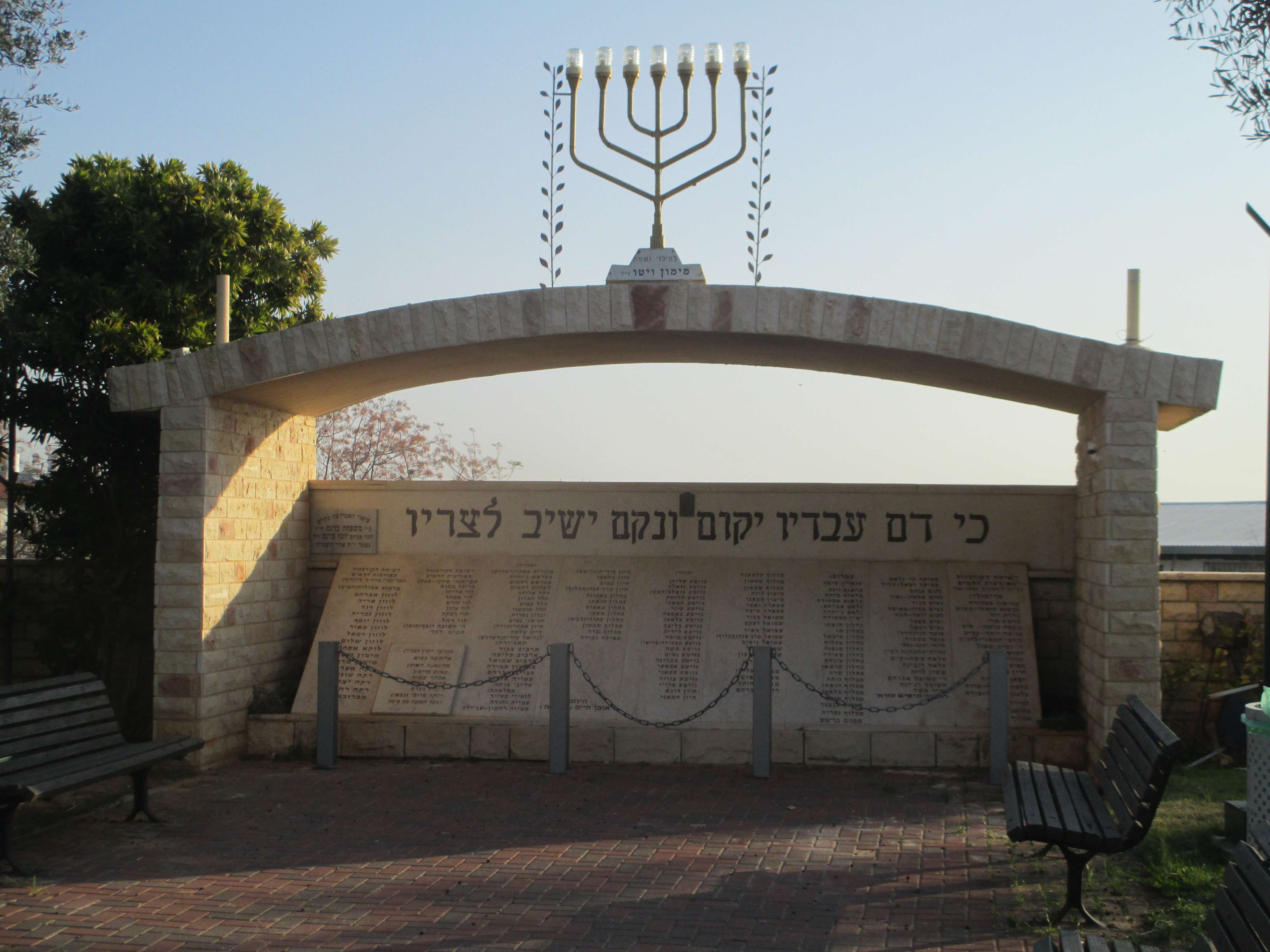 אנדרטת הנצחה בנתניה ליהודי לוב שנרצחו בפרעות